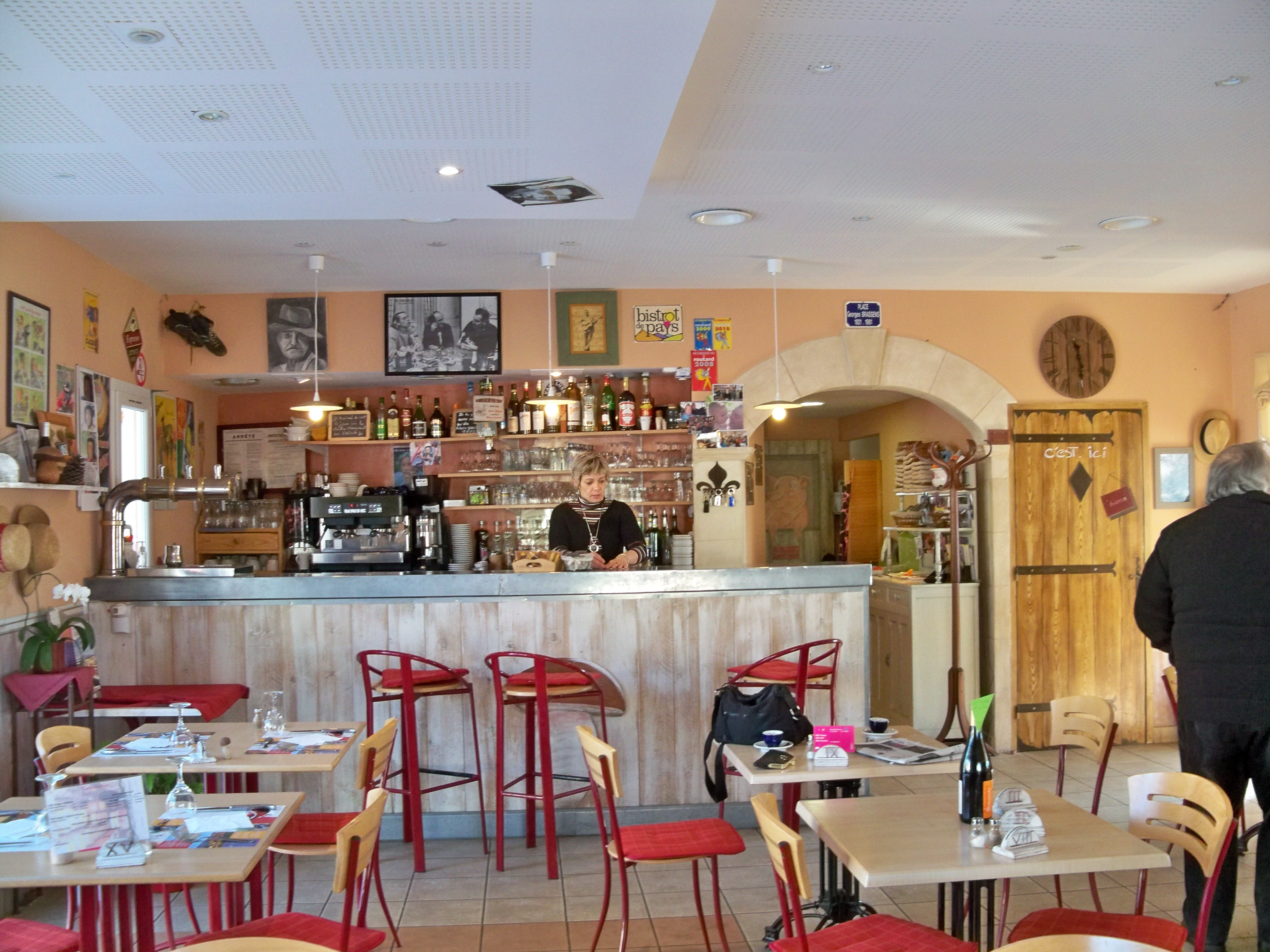 Salle du Bistrot de pays à Saint Trinit, Vaucluse, France